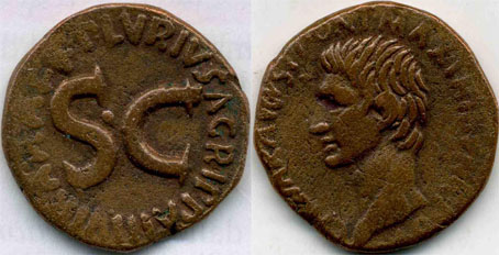 Coin of Marcus Agrippa (Asse romano coniato durante il terzo consolato di Marco Vipsanio Agrippa ritrovato in una campagna nell'agro di Barletta. E' un oggetto in mio possesso e pertanto rilascio questa immagine nel pubblico dominio.--Vipstano 00:08, 31 ago 2006 (CEST)) Roman as coined during the third consulate of Marcus Vipsanius found on the territory of Barletta. It is an object in the possession of Vipstano (user in the Italian Wikipedia) and released by him into the public domain